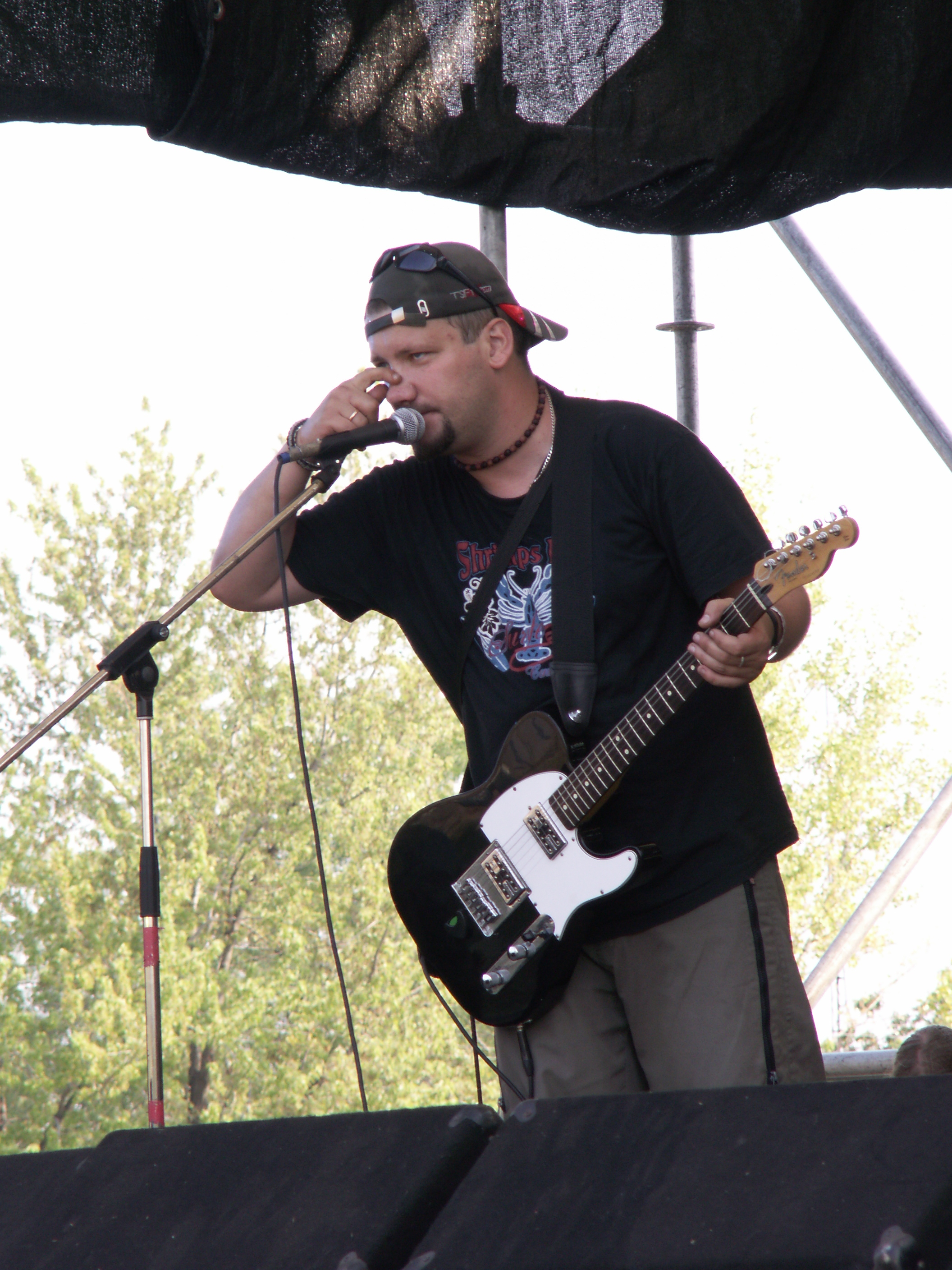 Беларуская (тарашкевіца): Яўген Бузоўскі, Гуляйполе, Украіна